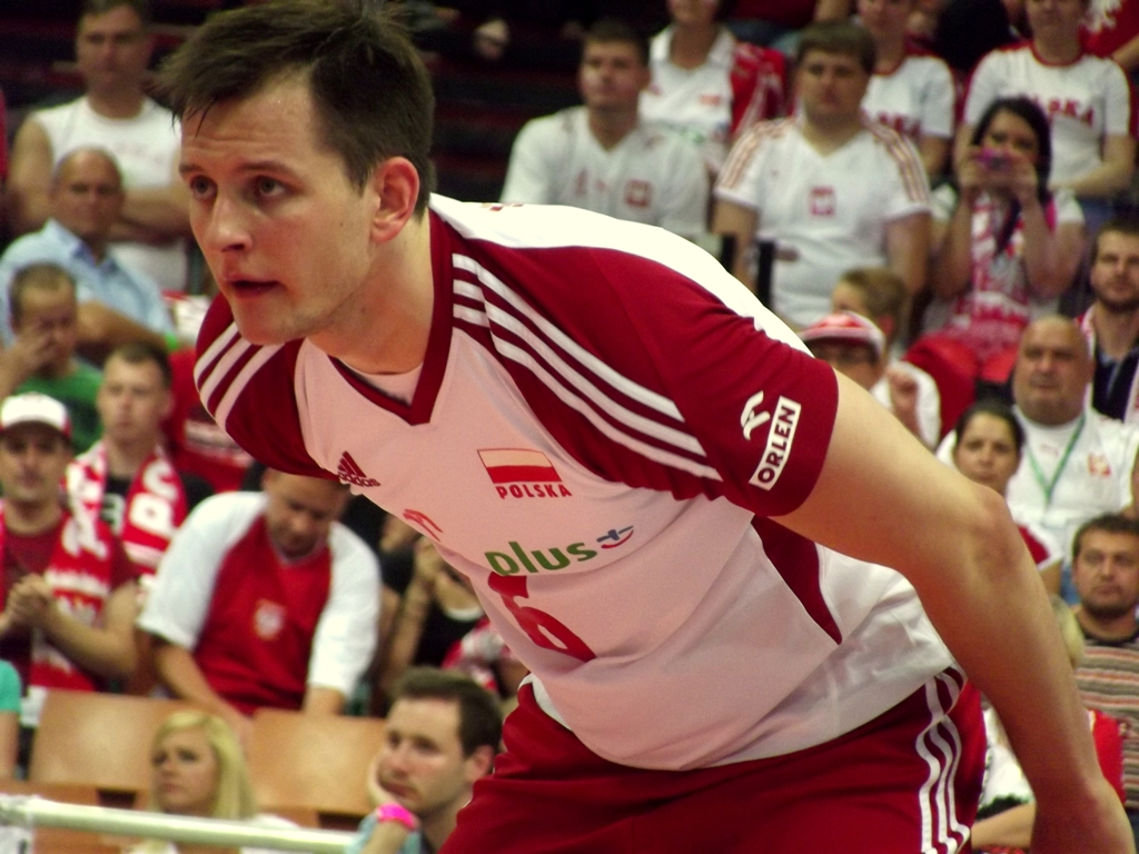 Zdjęcie zrobione podczas meczu Polska - USA siatkarskiej Ligii Światowej w katowickim Spodku.